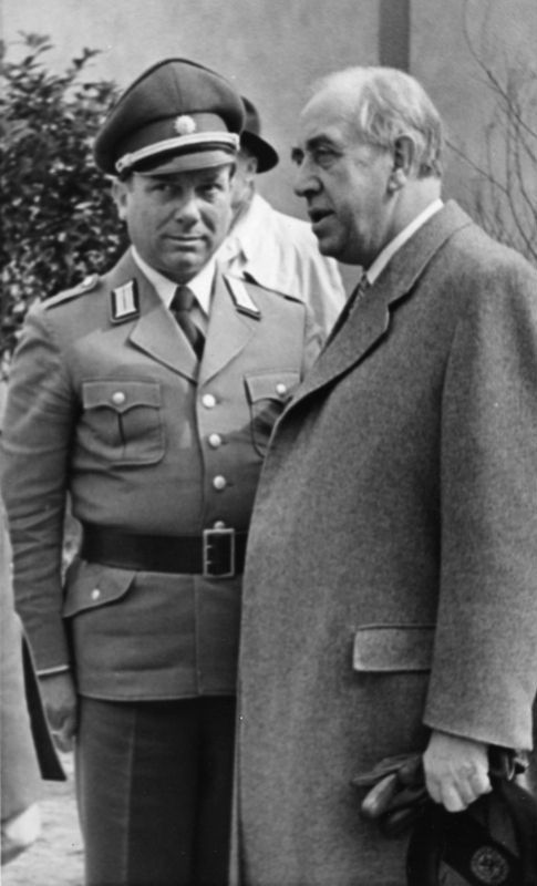 Berlin.- Regierender Bürgermeister Ernst Reuter (rechts) im Gespräch mit dem Kommandeur der Berliner Schutzpolizei Erich Duensing (in Uniform).